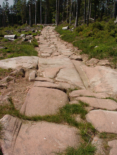 Voie Romaine près de Raon_les_Leau (88) (© Francis MONTIGNON) GFDL Francis MONTIGNON